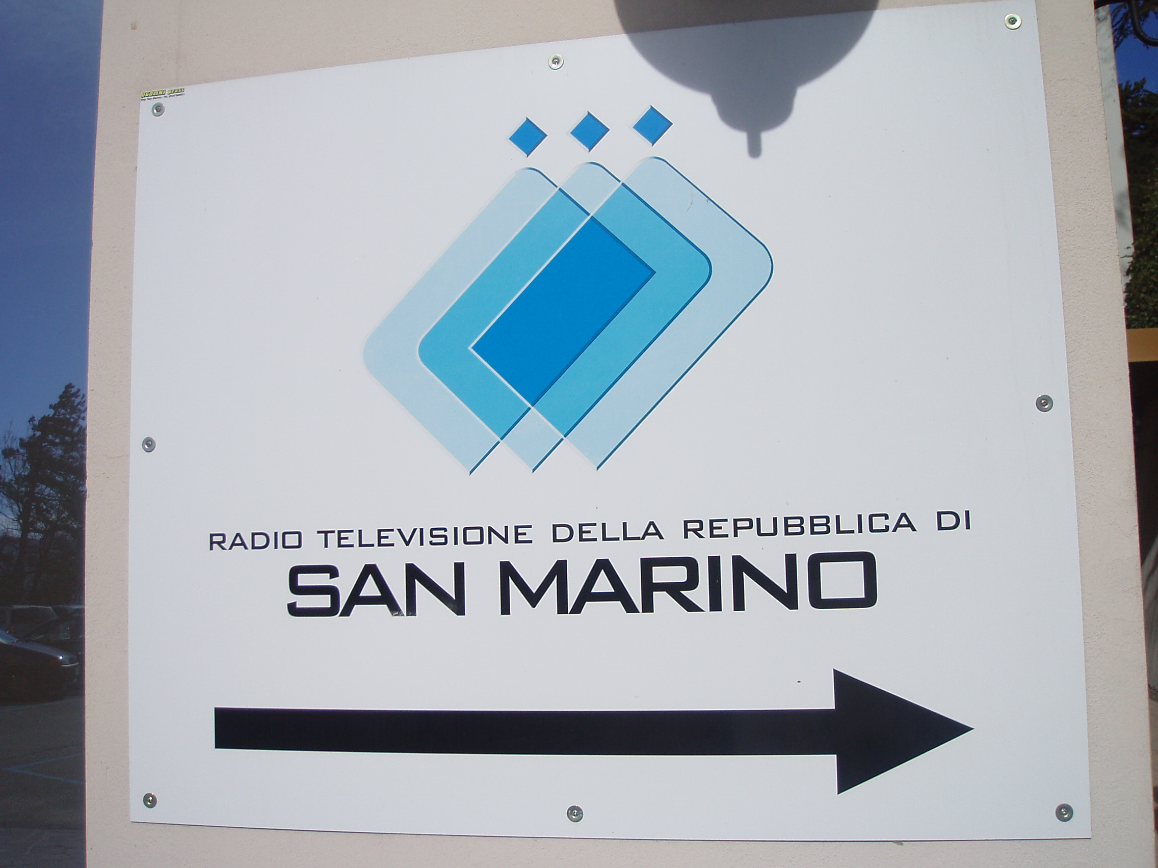 Logo all'ingresso di San Marino RTV